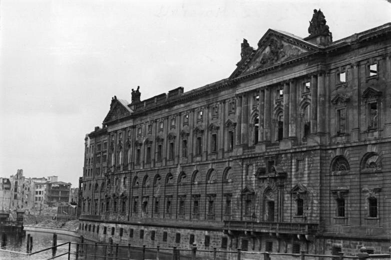 Berlin, Marstall, Ruine, Dachstuhl Illus Funck 4.9.51 Das alte Marstallgebäude in Berlin.UBz: Teilansicht.